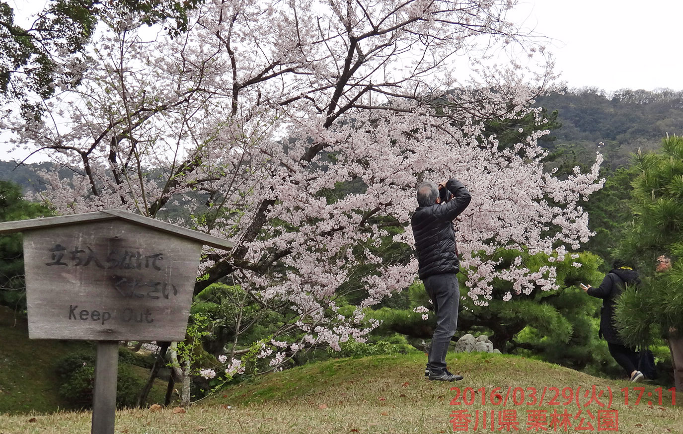 香川県の栗林公園で立ち入り禁止エリアに入り込み、写真撮影をしている外国人観光客。4歳程度の女児も一緒。中国語で会話していたが、パスポートを確認しているわけではないので、どこの国なのかは不明。